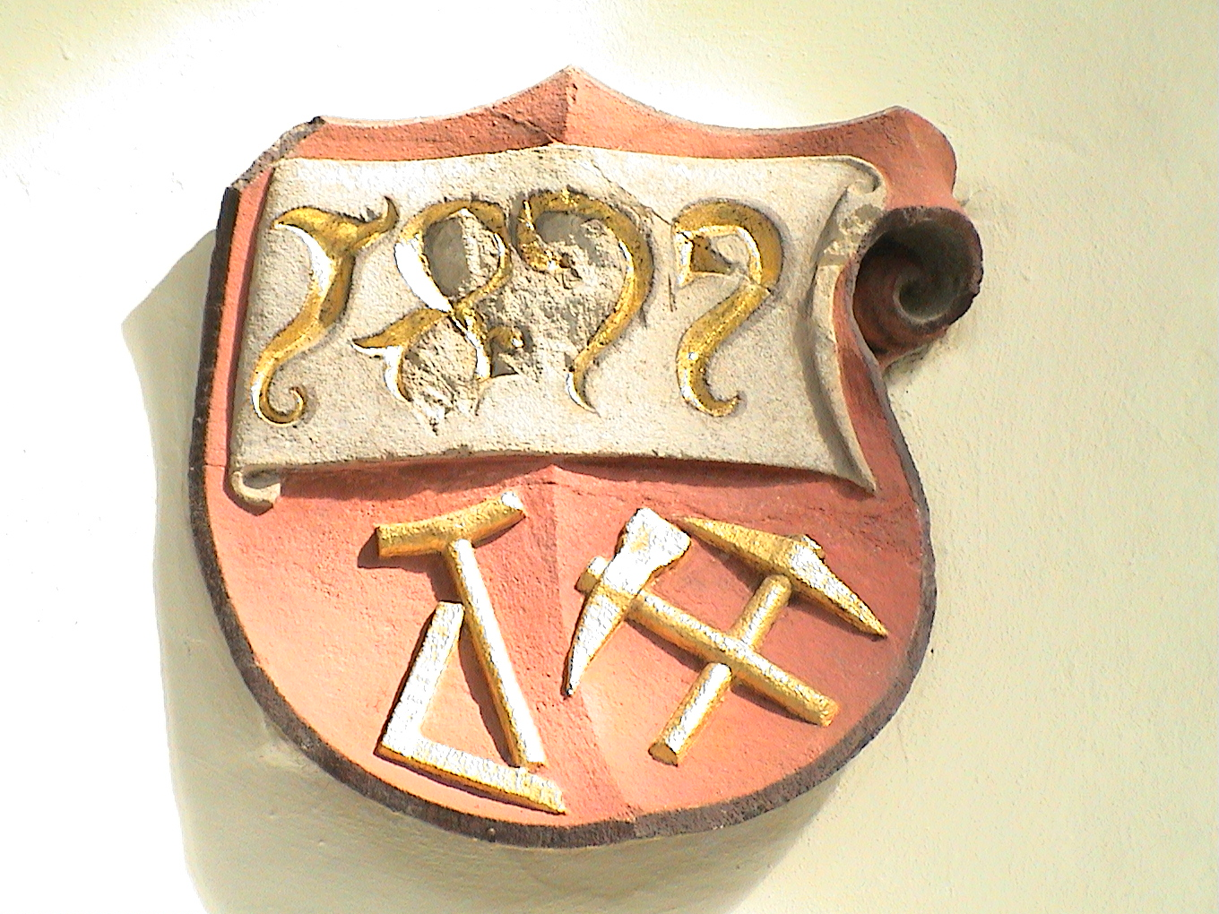 schlussstein 1492